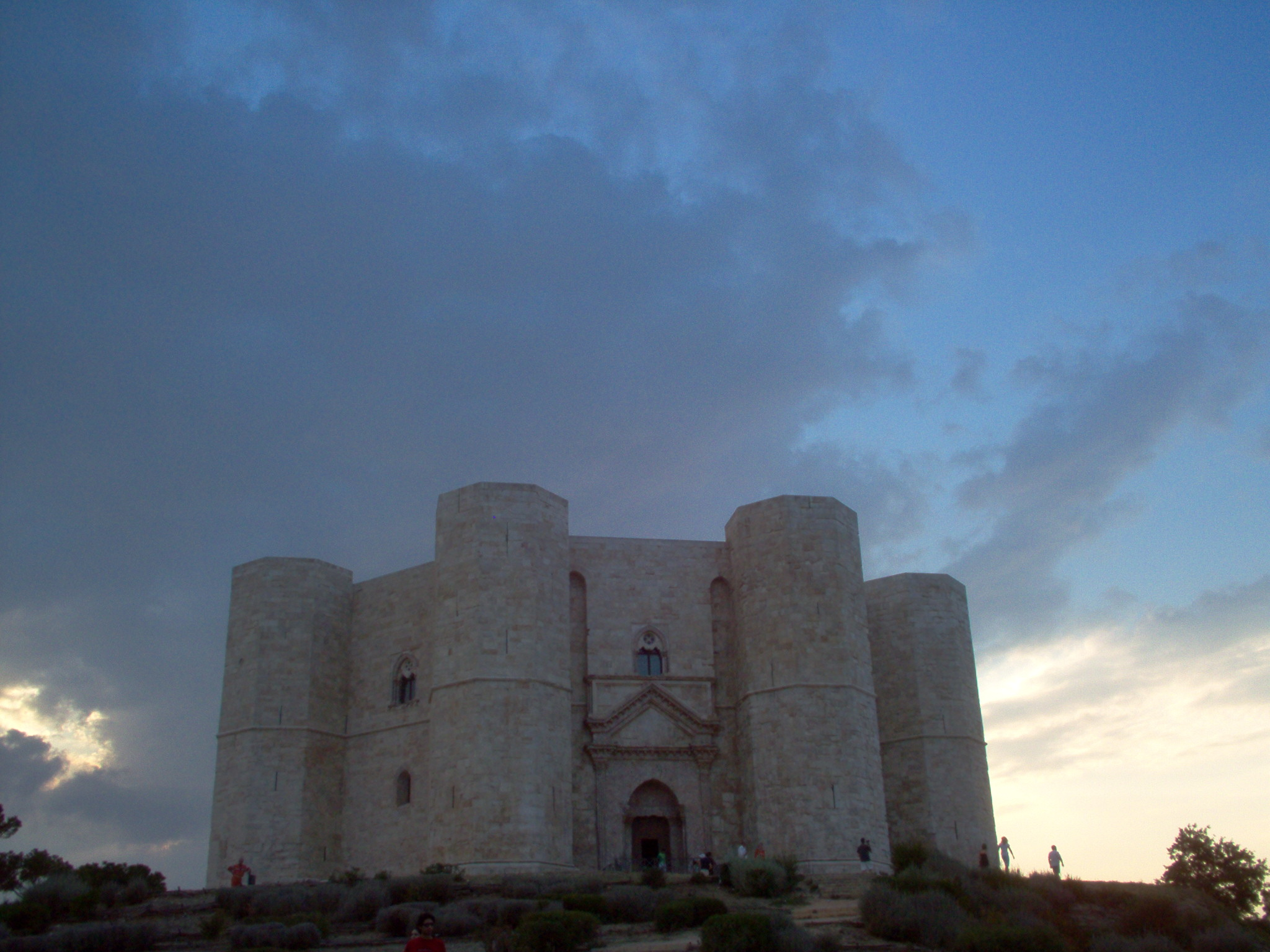 From wiki uploaded by Utente:Vipstano foto amatoriale scattata da me medesimo. Fatene ciò che volete.